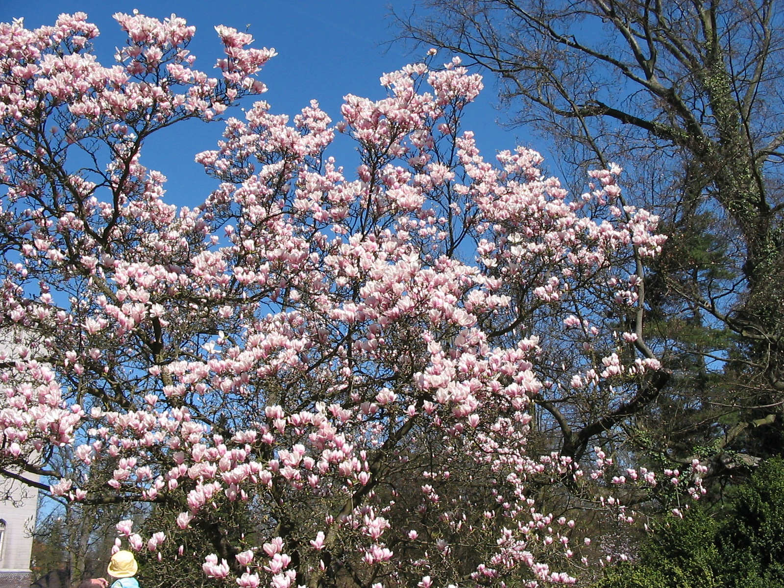 Magnolia w Arboretum w Kórniku. Zdjęcie wykonane dnia 14 kwietnia 2007 w Arboretum w Kórniku. Magnolia in Arboretum in Kórnik. Photo was taken 14th April 2007 in Arboretum in Kórnik (Poland). Autor: Piotrm00